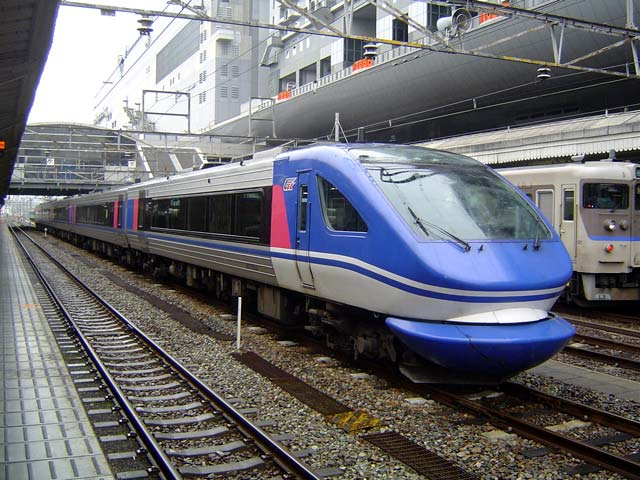 智頭急行HOT7000系気動車（2005年1月6日、Koneが京都駅で撮影）